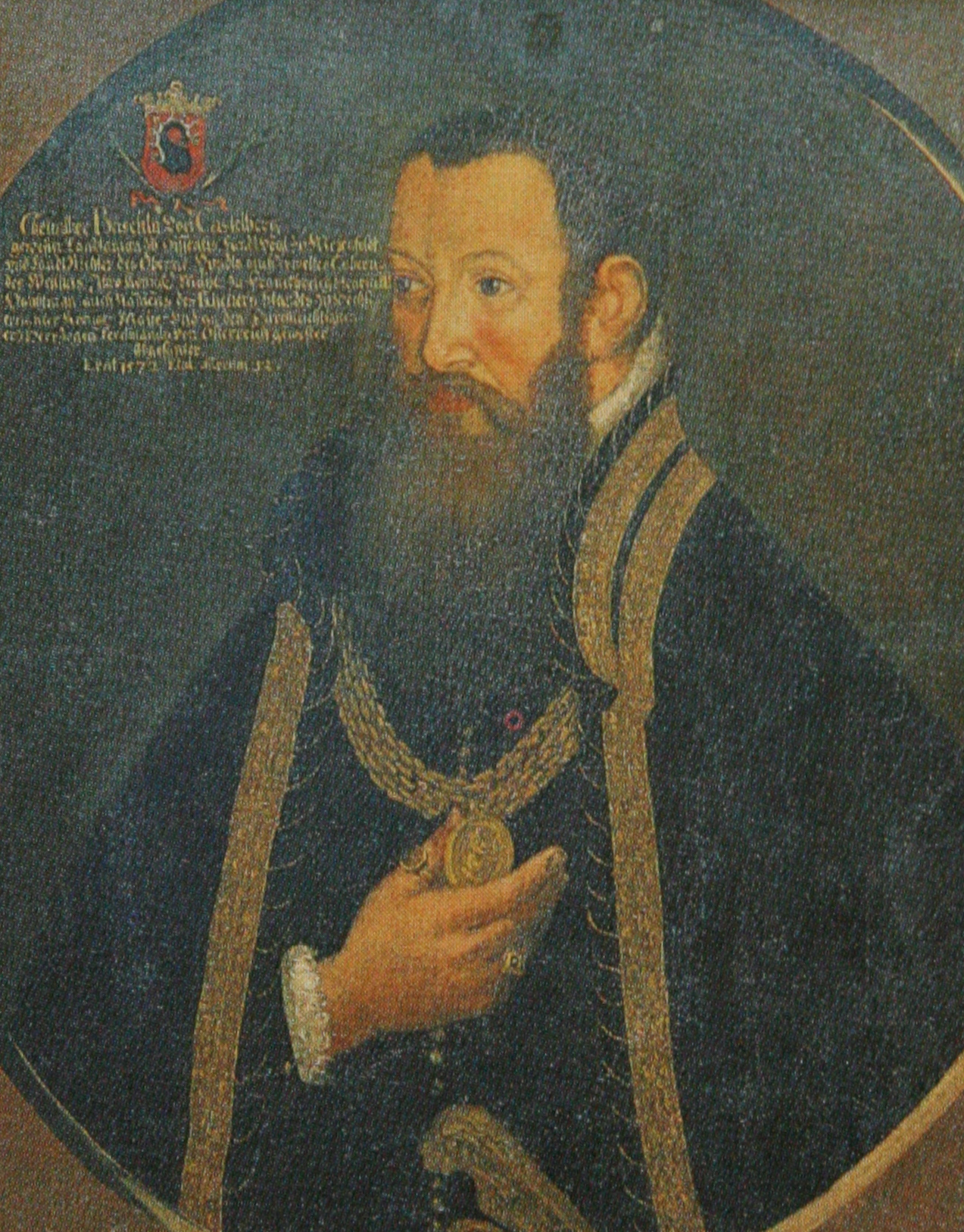 Ritter Sebastian von Castelberg; Erbauer Schloss Caschliun.